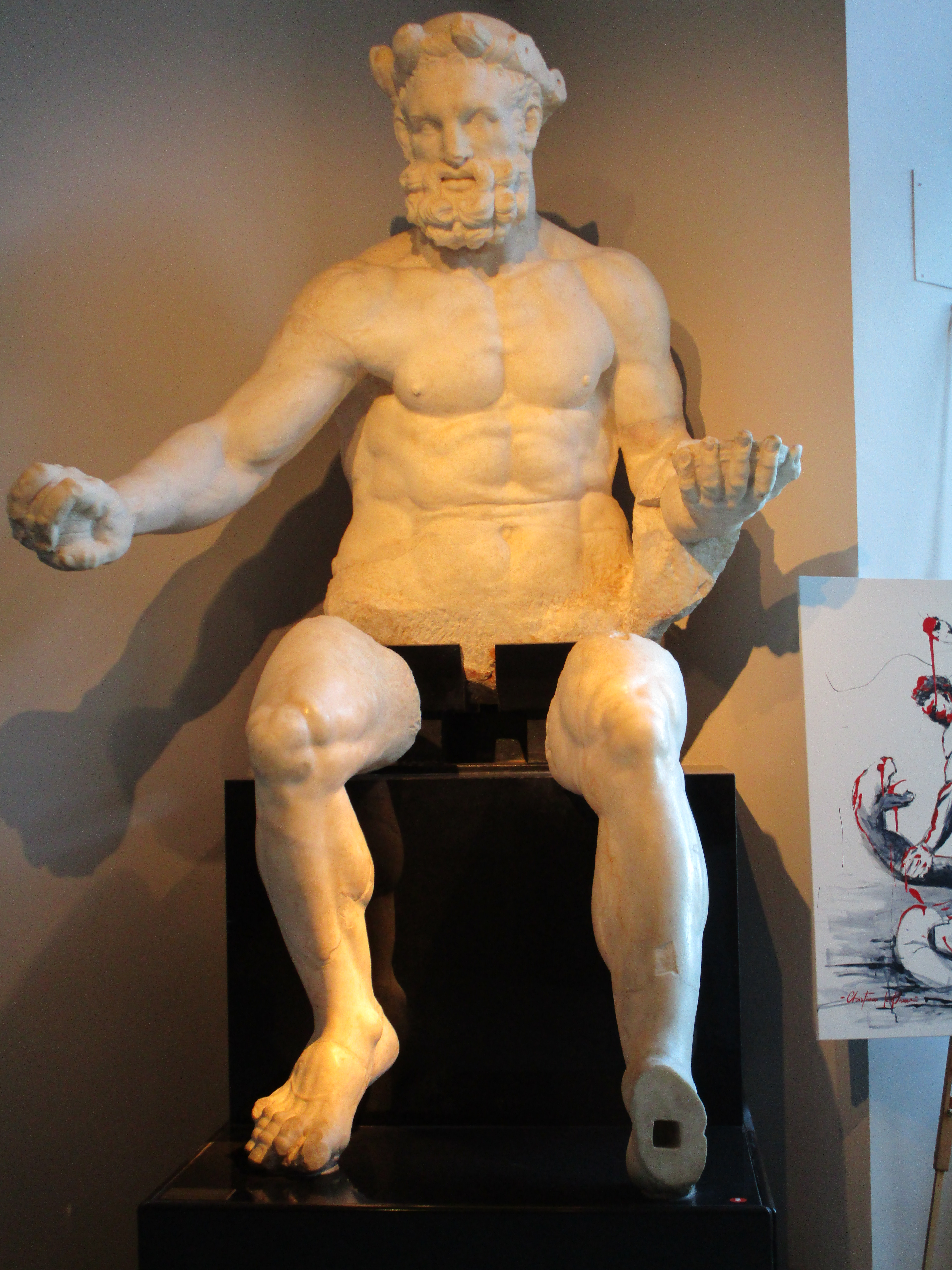 La colossale statua in marmo greco di Ercole rinvenuta nel santuario di Alba Fucens e conservata nel Museo archeologico nazionale d'Abruzzo, a Chieti